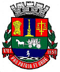 Brasão de armas do município de Juiz de Fora, Minas Gerais, Brasil.